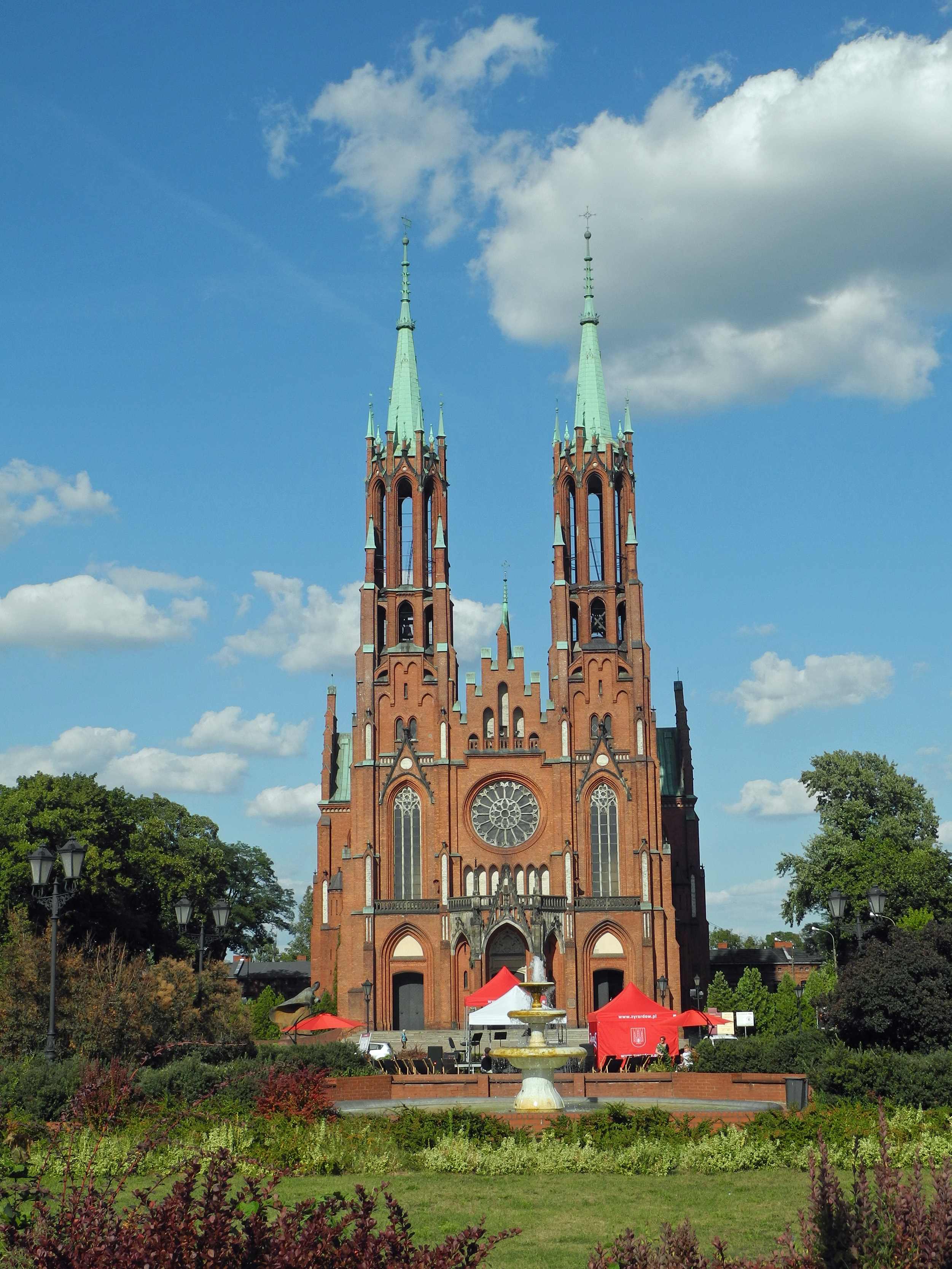 Röm.-kath. Pfarrkirche Maria Trost in Żyrardów am Johann-Paul-II.-Platz, erbaut 1900–1903 nach einem Entwurf des Architekten Józef Pius Dziekoński (1844–1927)